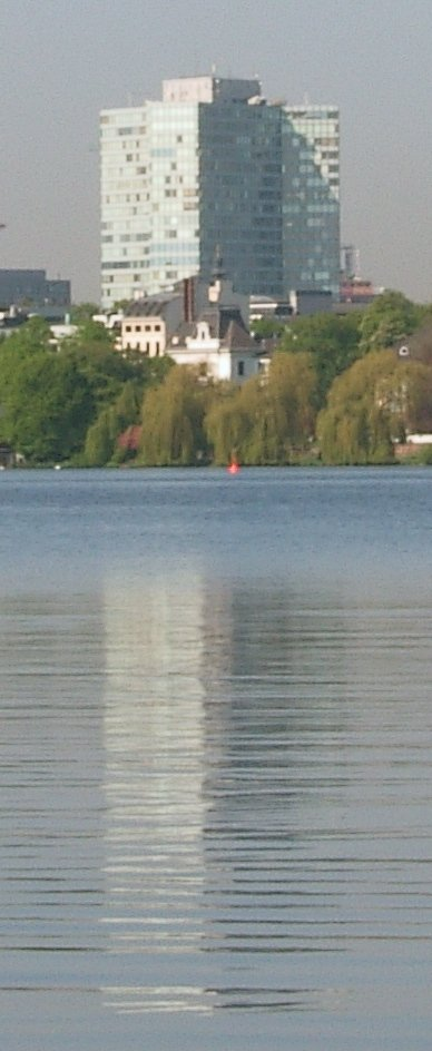 Das Unilever-Haus am Valentinskamp in der Hamburger Neustadt steht auf dem Gebiet des ehemaligen Gängeviertels. Es wurde von 1958 bis 1964 von dem Architekturbüro Hentrich und Petschnigg erbaut und gilt, als freistehender Solitär, als ein Idealbild der Nachkriegsmoderne.